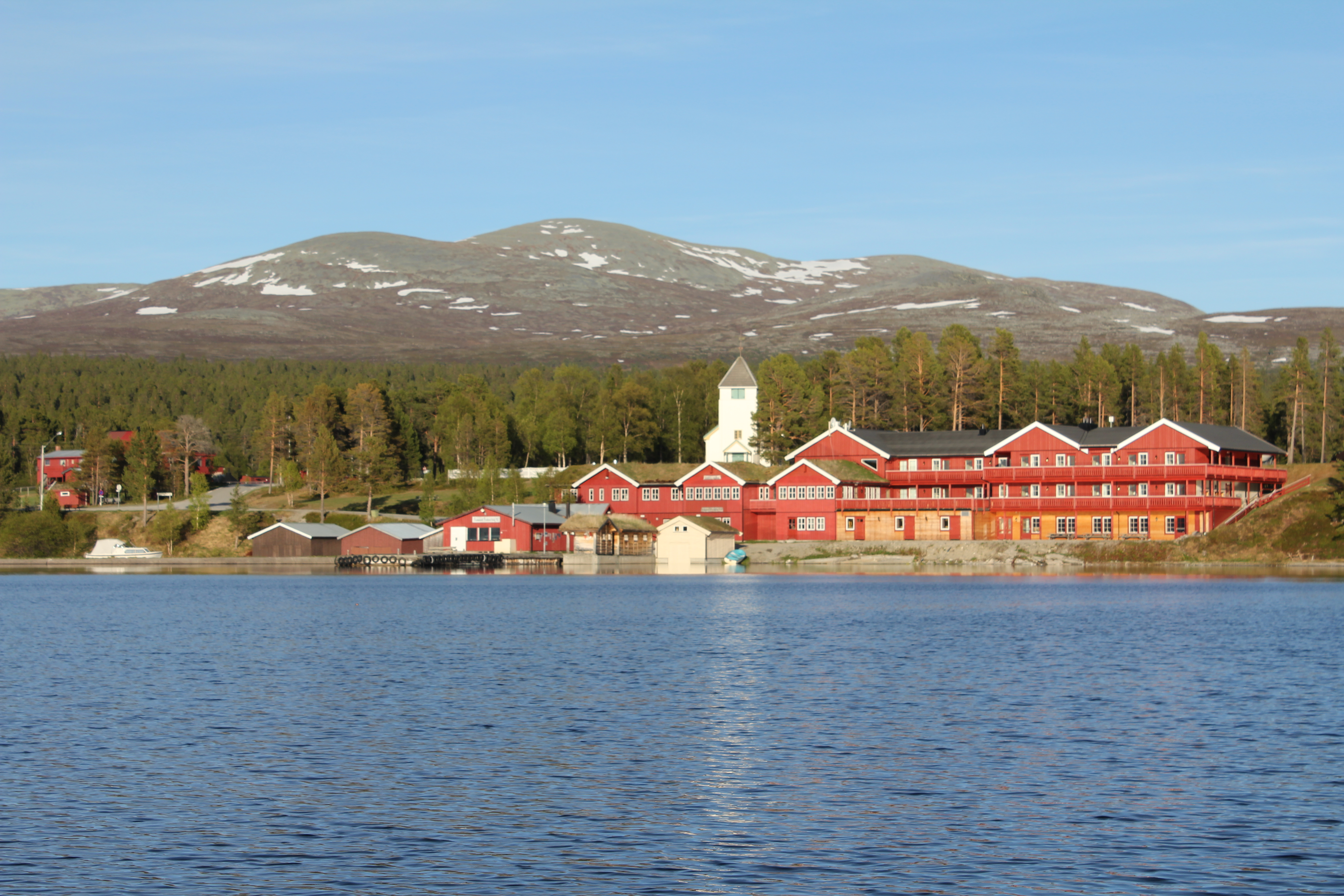 Bryggeområdet ved Elgå.